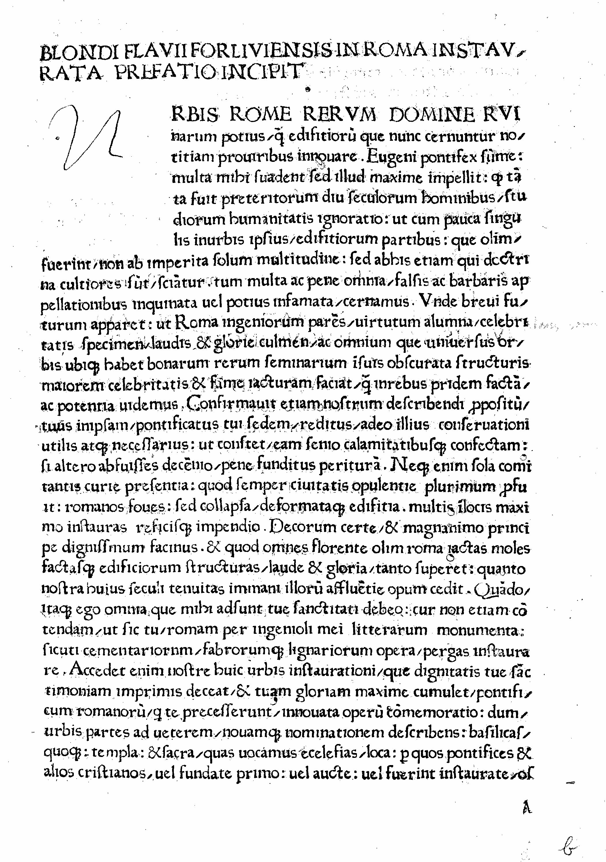 Blondus Romae instauratae page 1, 1471 edition